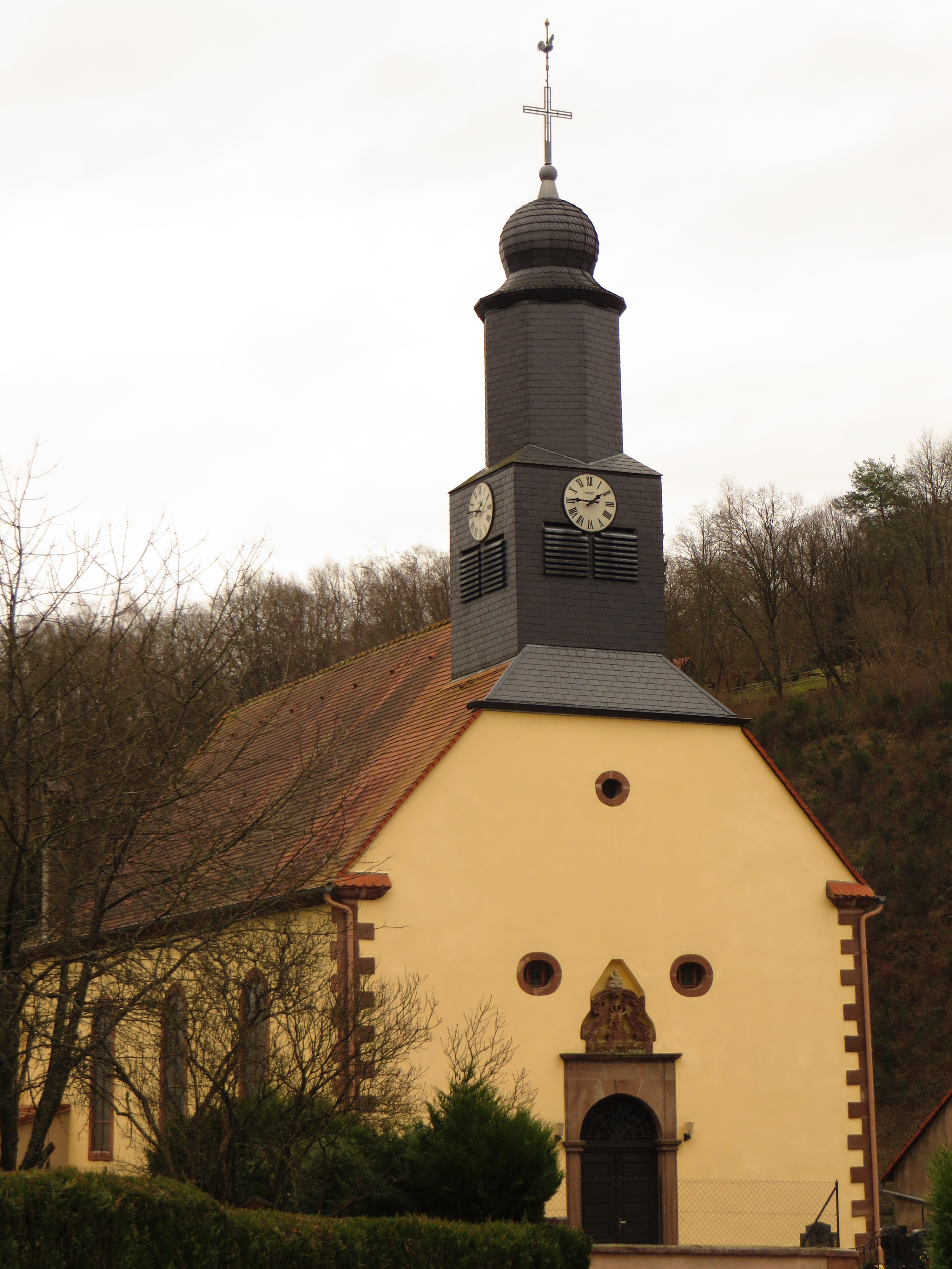 Bousseviller eglise